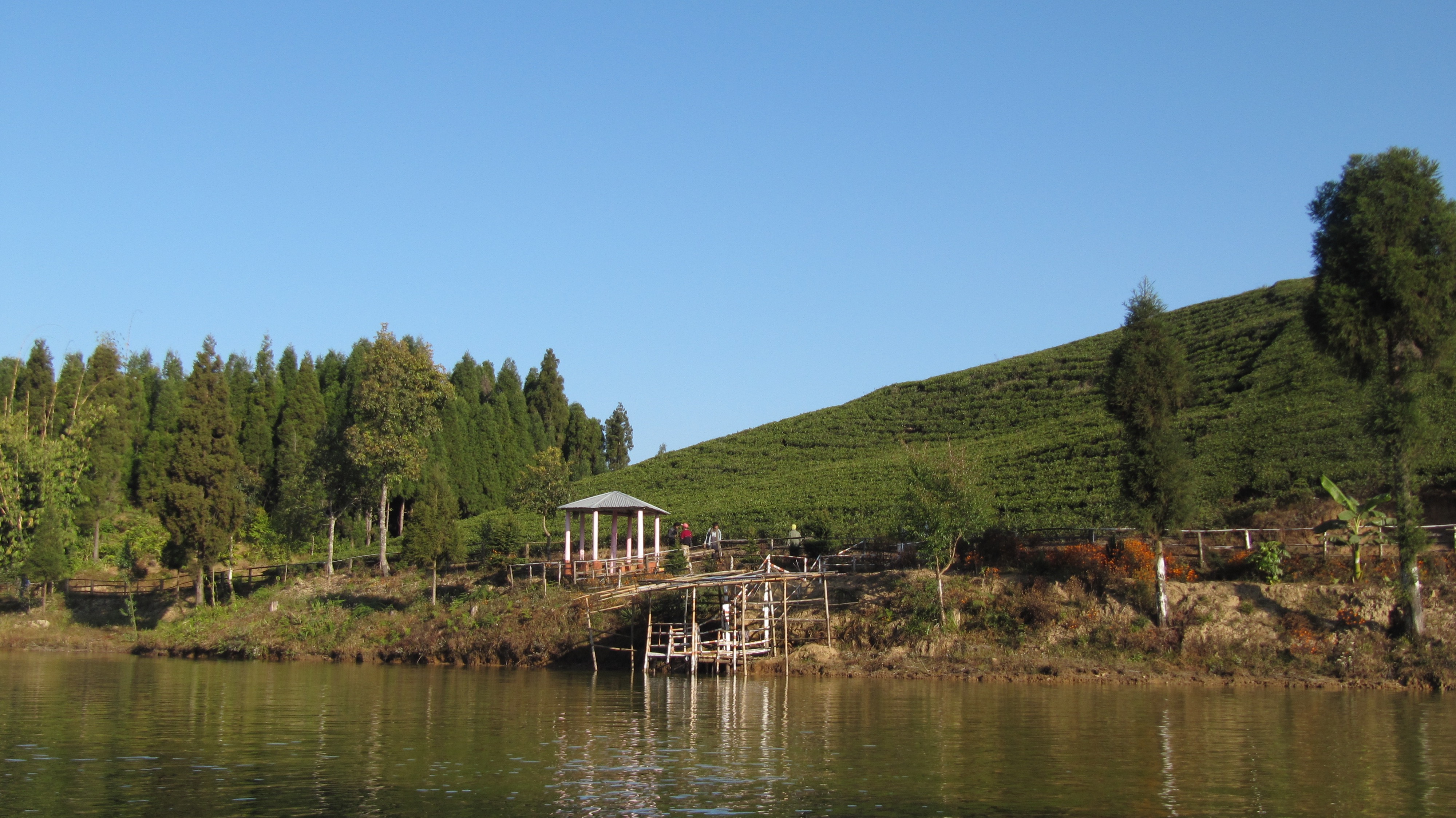 ईलामको अन्तु पोखरी